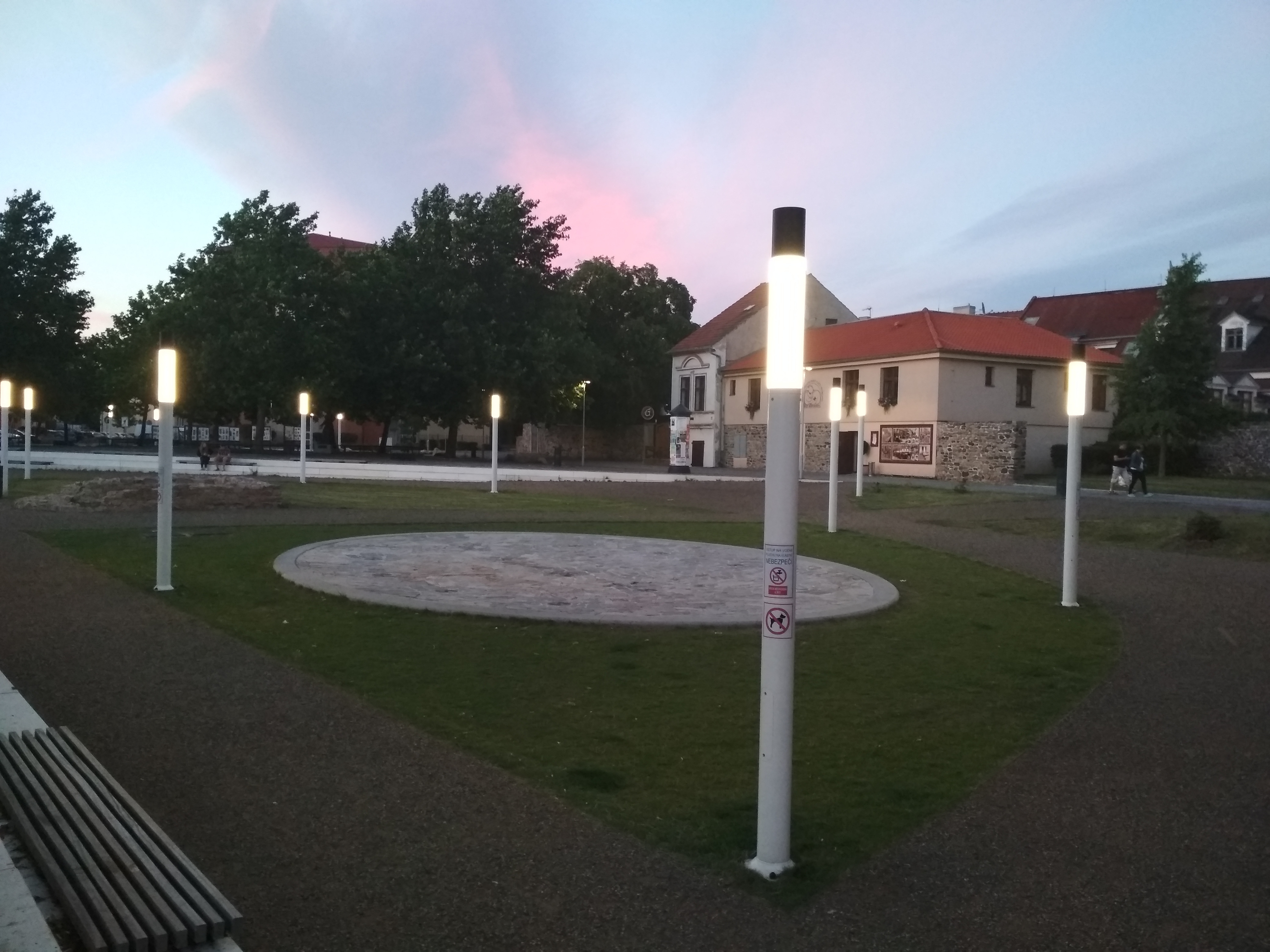 Studentské náměstí v Kadani.